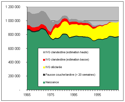 Superposition des statistiques de naissance et des statistiques d'avortement en France à partir de 1965 (données 2005)